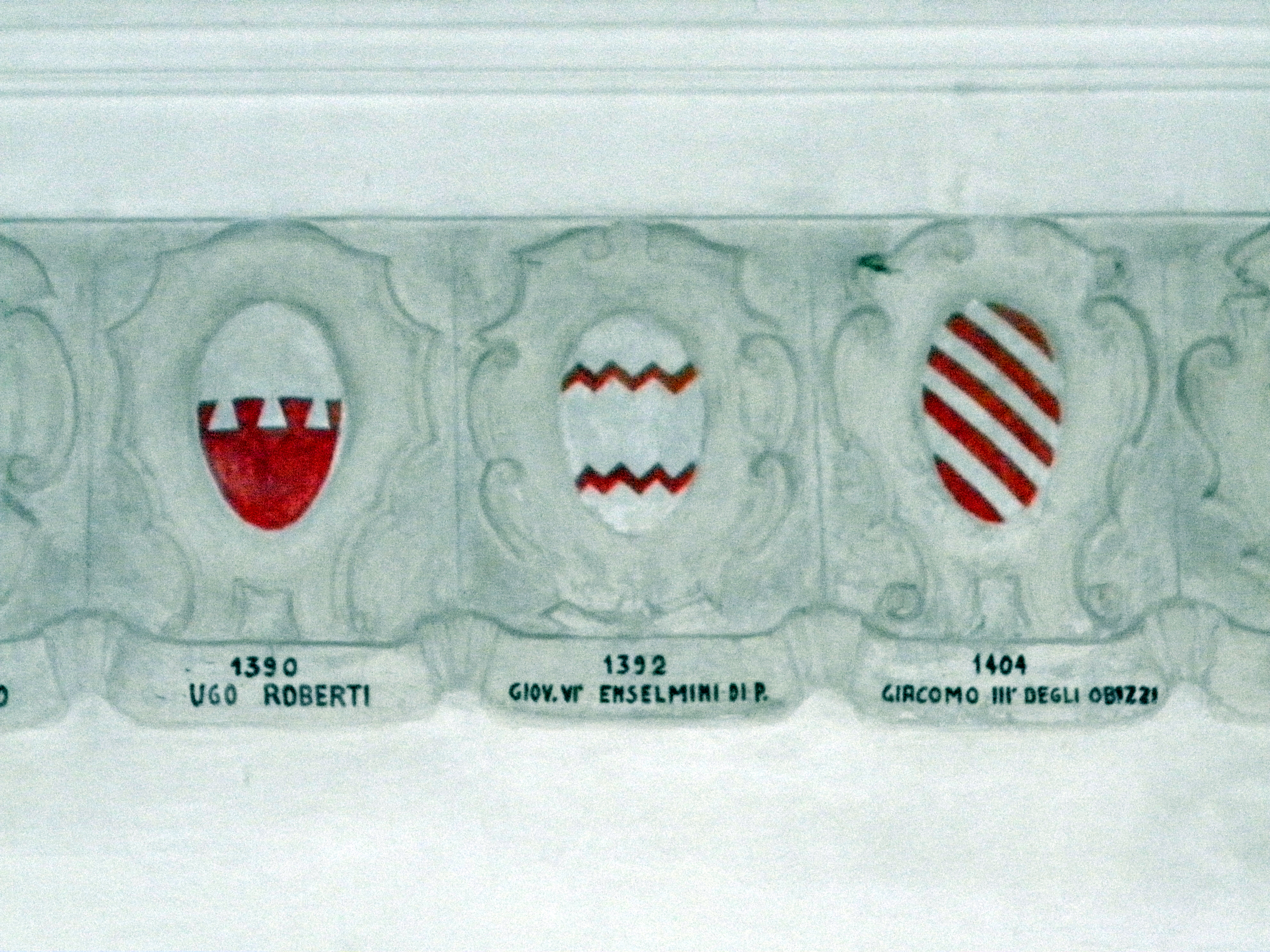 Adria, Cattedrale dei Santi Pietro e Paolo, interno cattedrale vecchia, blasonature di alcuni vescovi che si sono succeduti a capo dell'originale Diocesi di Adria.